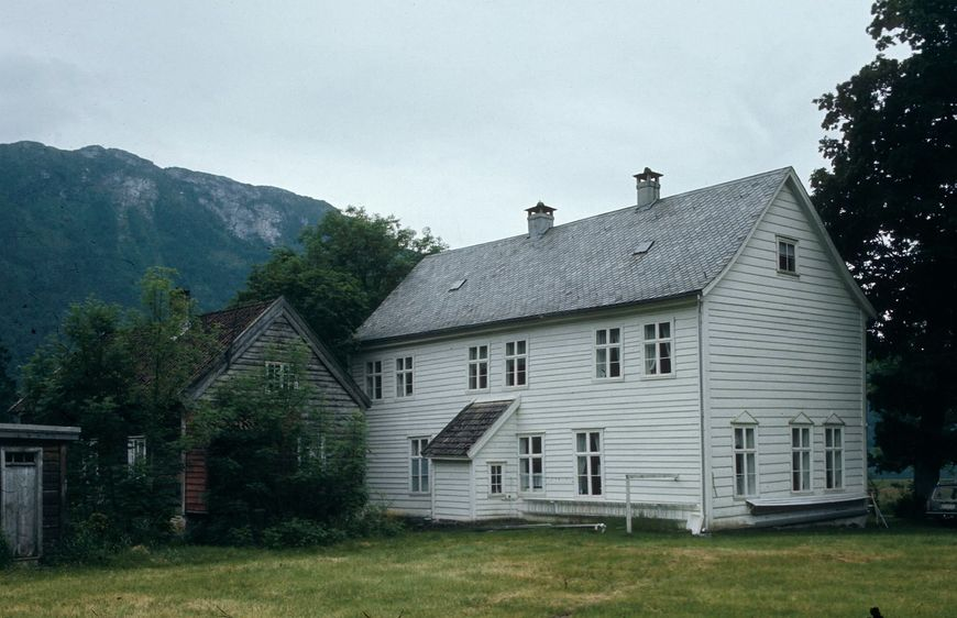 Osen gård (Gaular kommune). Foto: Ola Øgar Svendsen. Fra Riksantikvarens Kulturminnesøk.